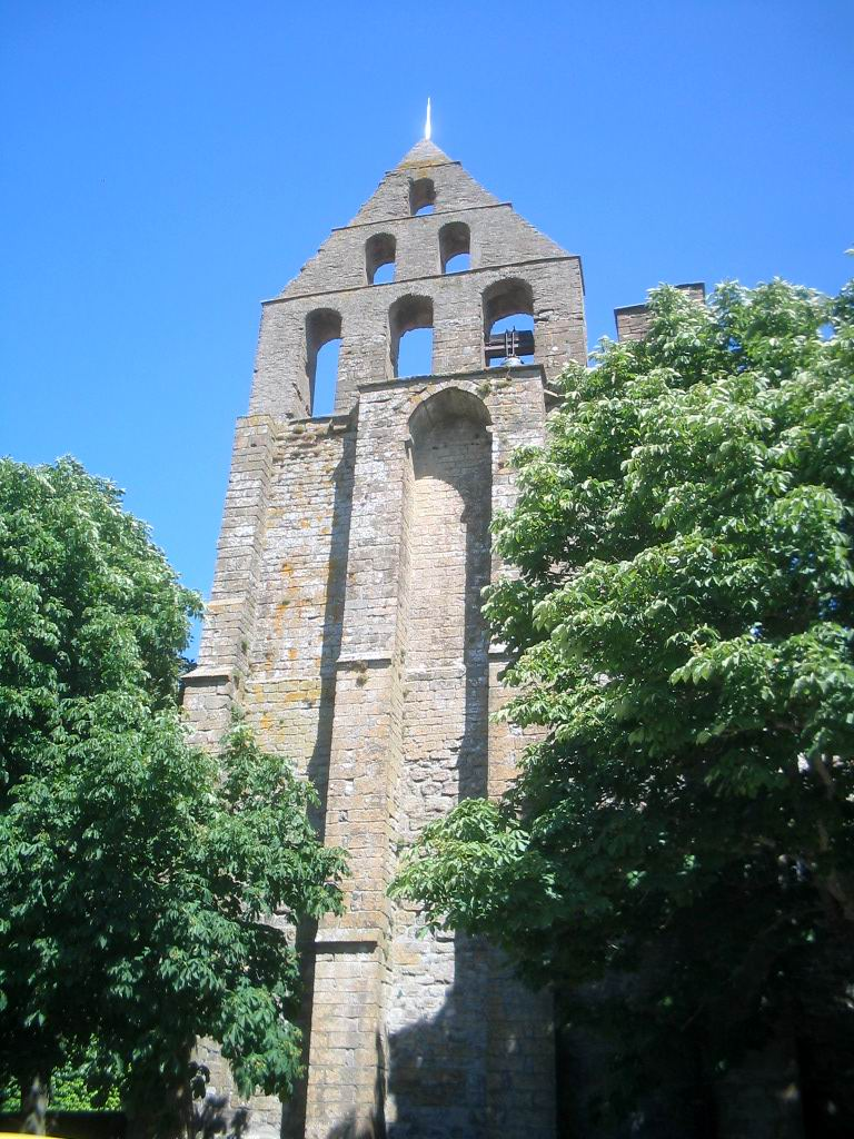 Église paroissiale à Mazerolles-du-Razès